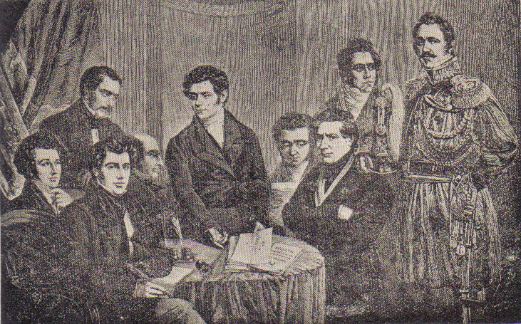 Gravure reproduisant un tableau du Gouvernement provisoire de Belgique en 1830